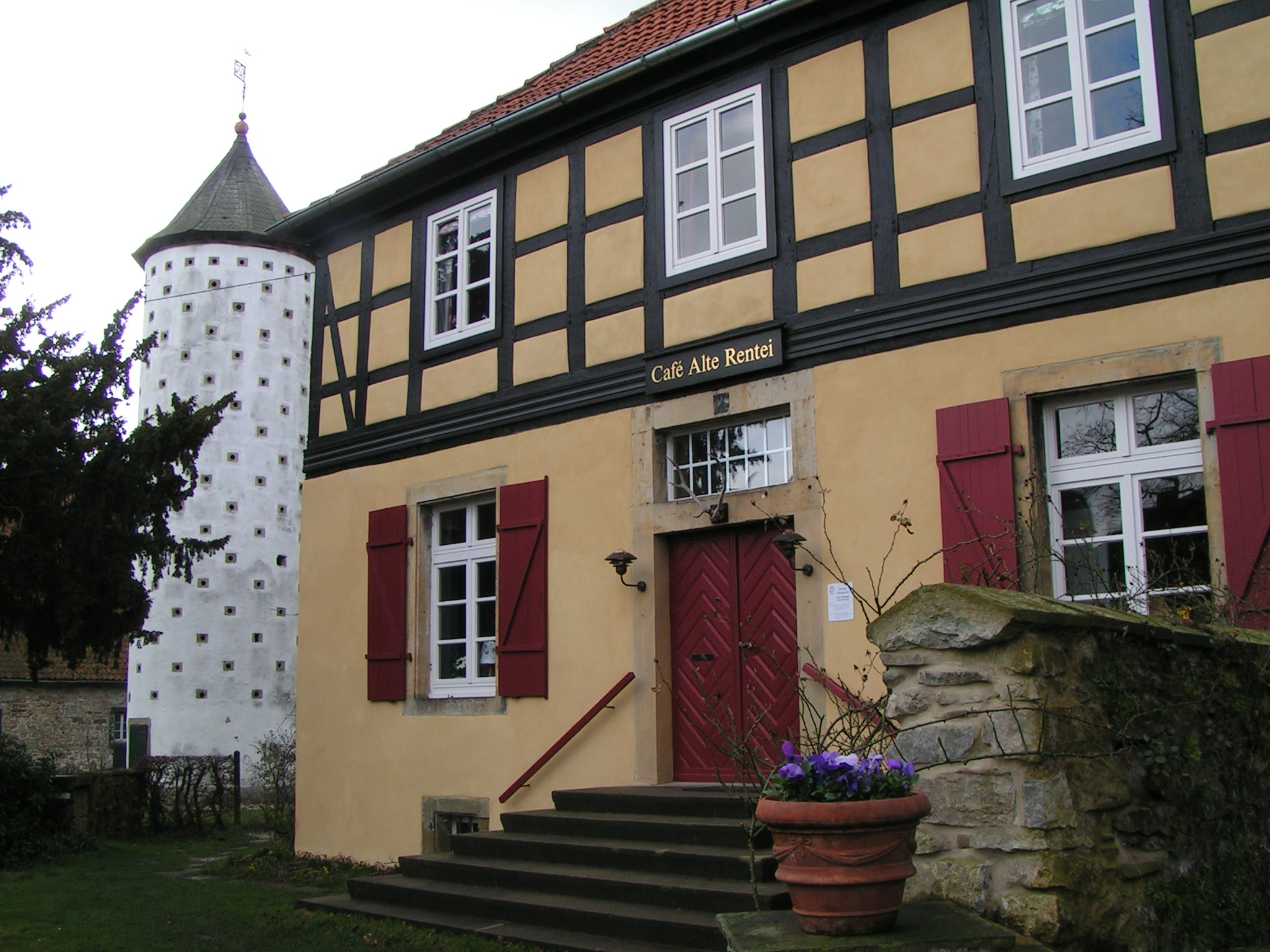 Alte Rentei auf dem Gelände von Schloss Hünnefeld (Bad Essen)